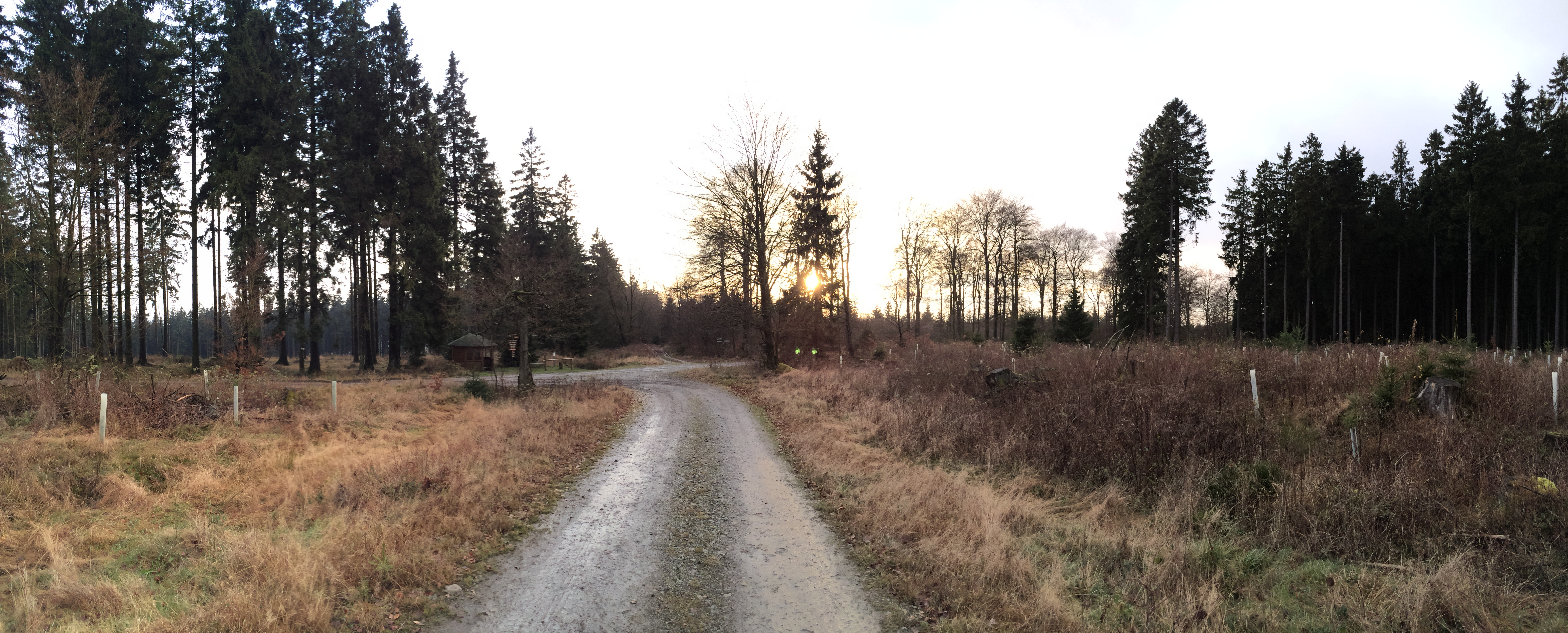 Dieses Bild wurde auf dem Jagdberg (Netphen) gemacht